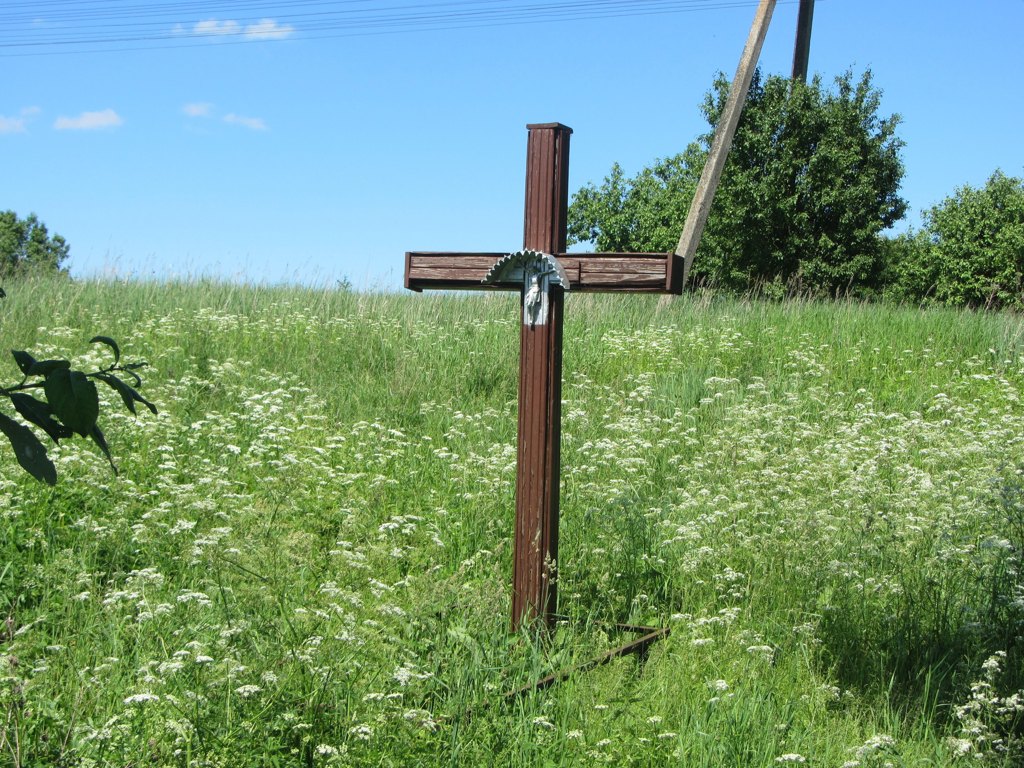 Bekupė, Lithuania